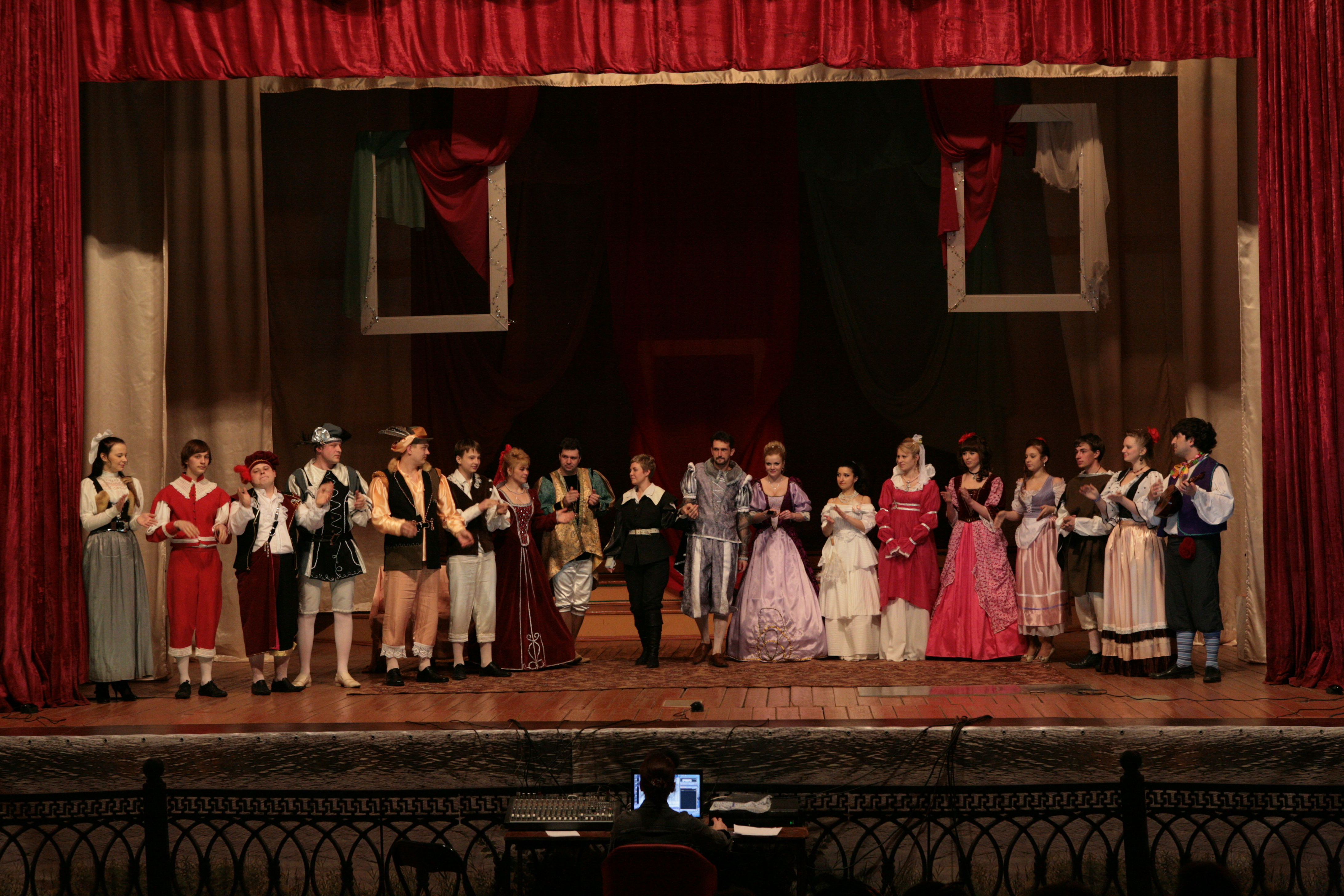 Однажды в Севилье 2